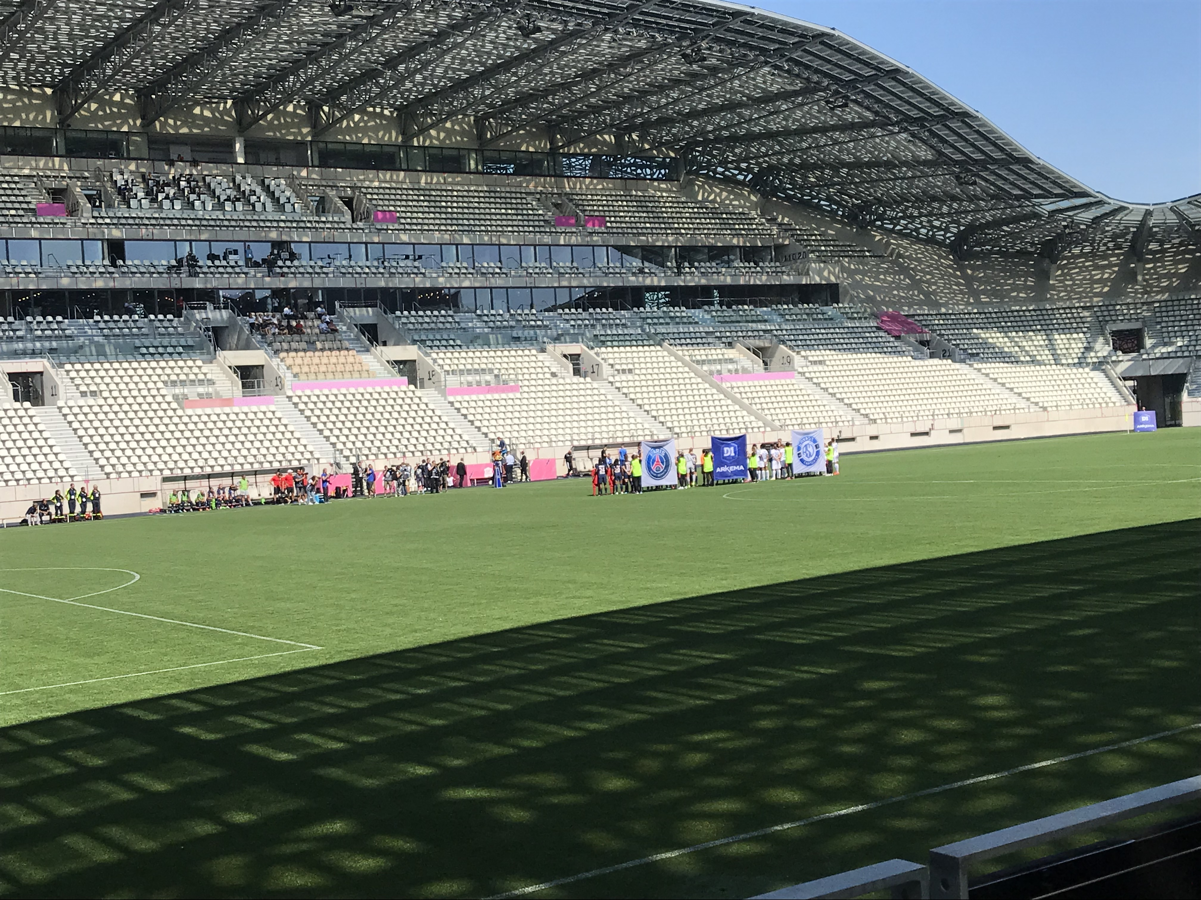 PSG-Soyaux Féminines Stade Jean Bouin